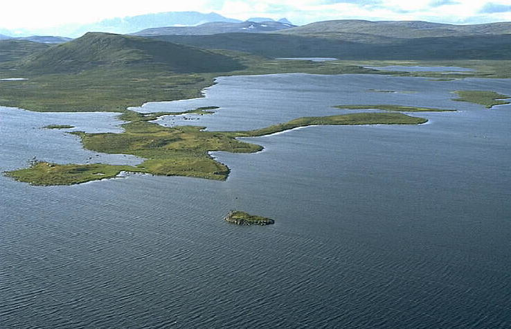 Seiddenjarga Motiv: Råstojaure Nyckelord: Flygbilder, Riksintressen Kategori: Insjömiljöer Seiddenjarga.